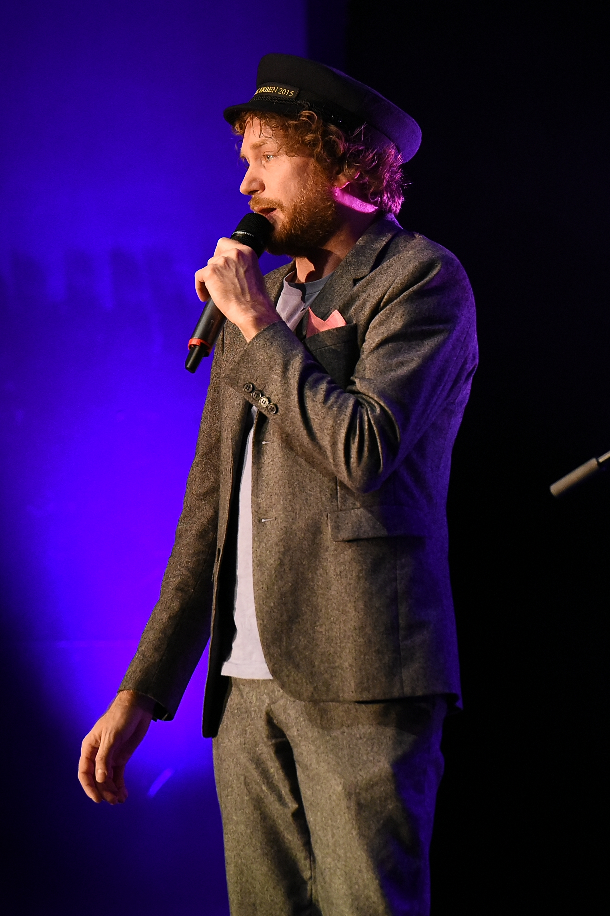 Friedemann Weise bei Tegtmeiers Erben 2015 im Kulturzentrum Herne.